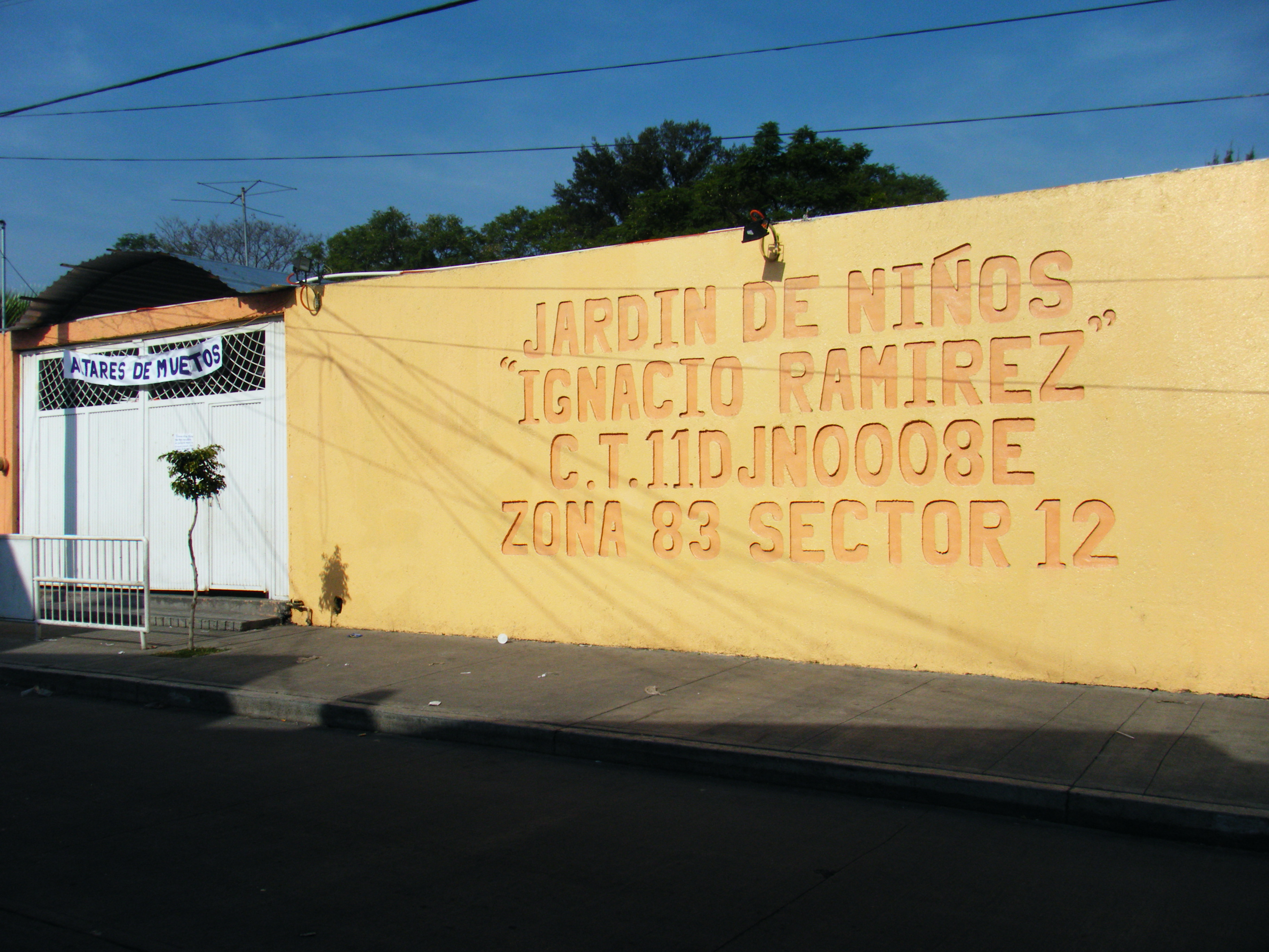 Jardin de niños Ignacio Ramírez Uriangato